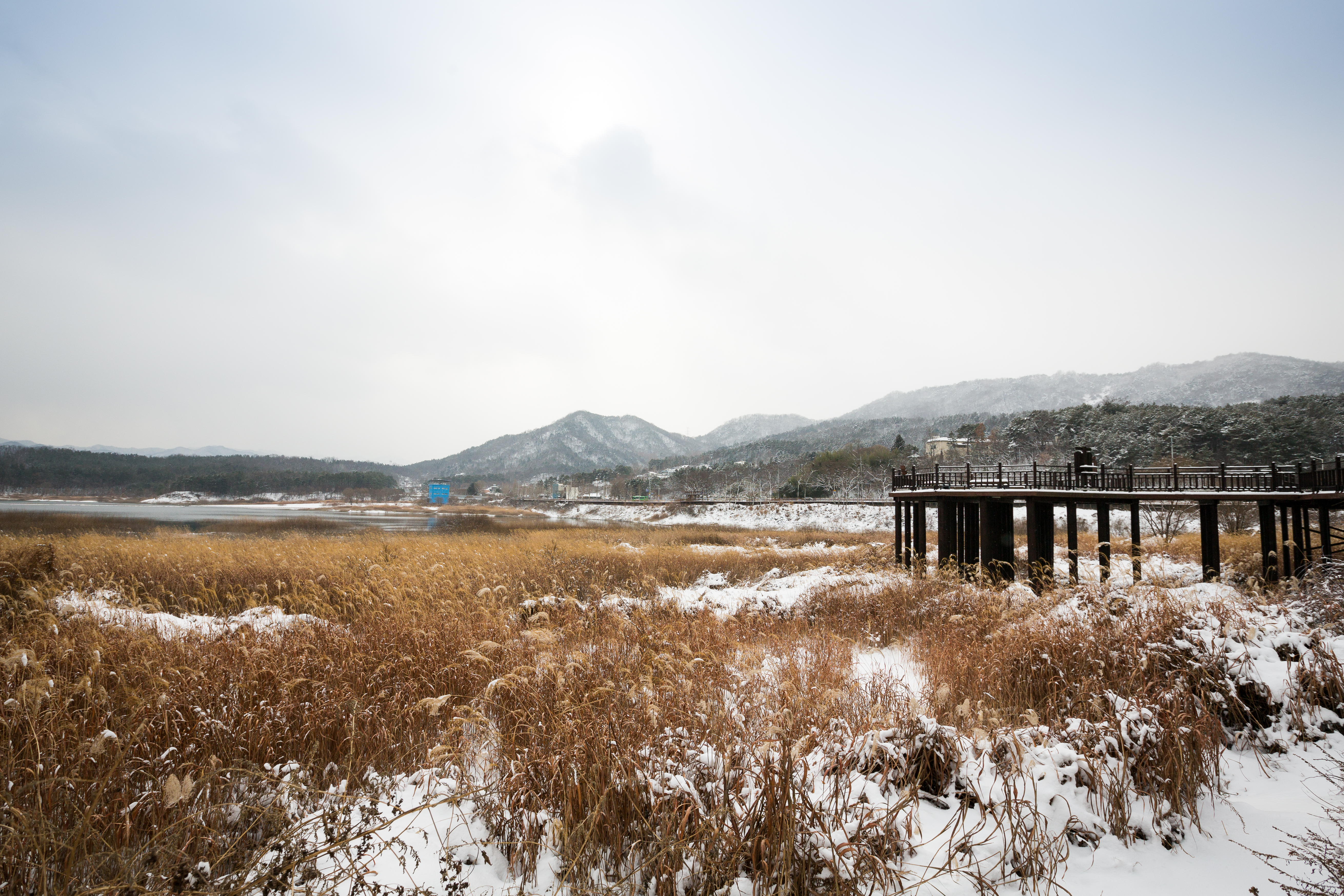 대청호오백리길 4구간_5